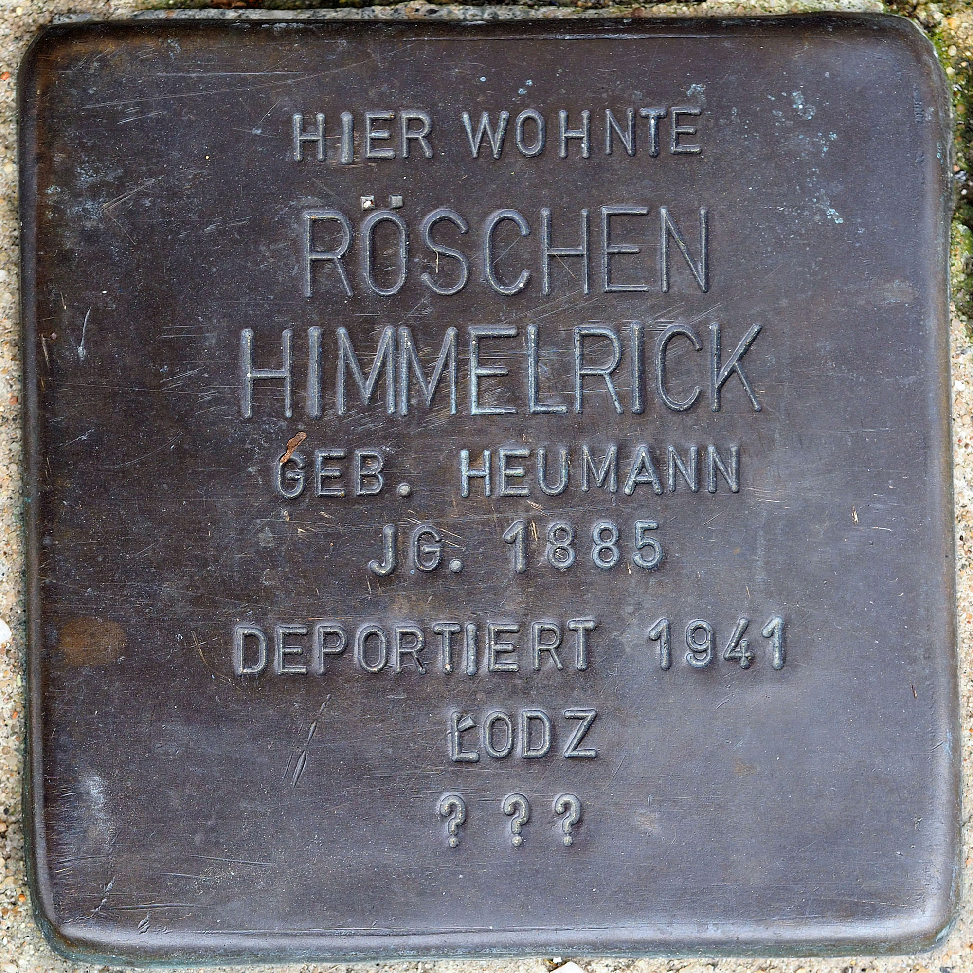 Stolpersteine MG: Himmelrick, Röschen